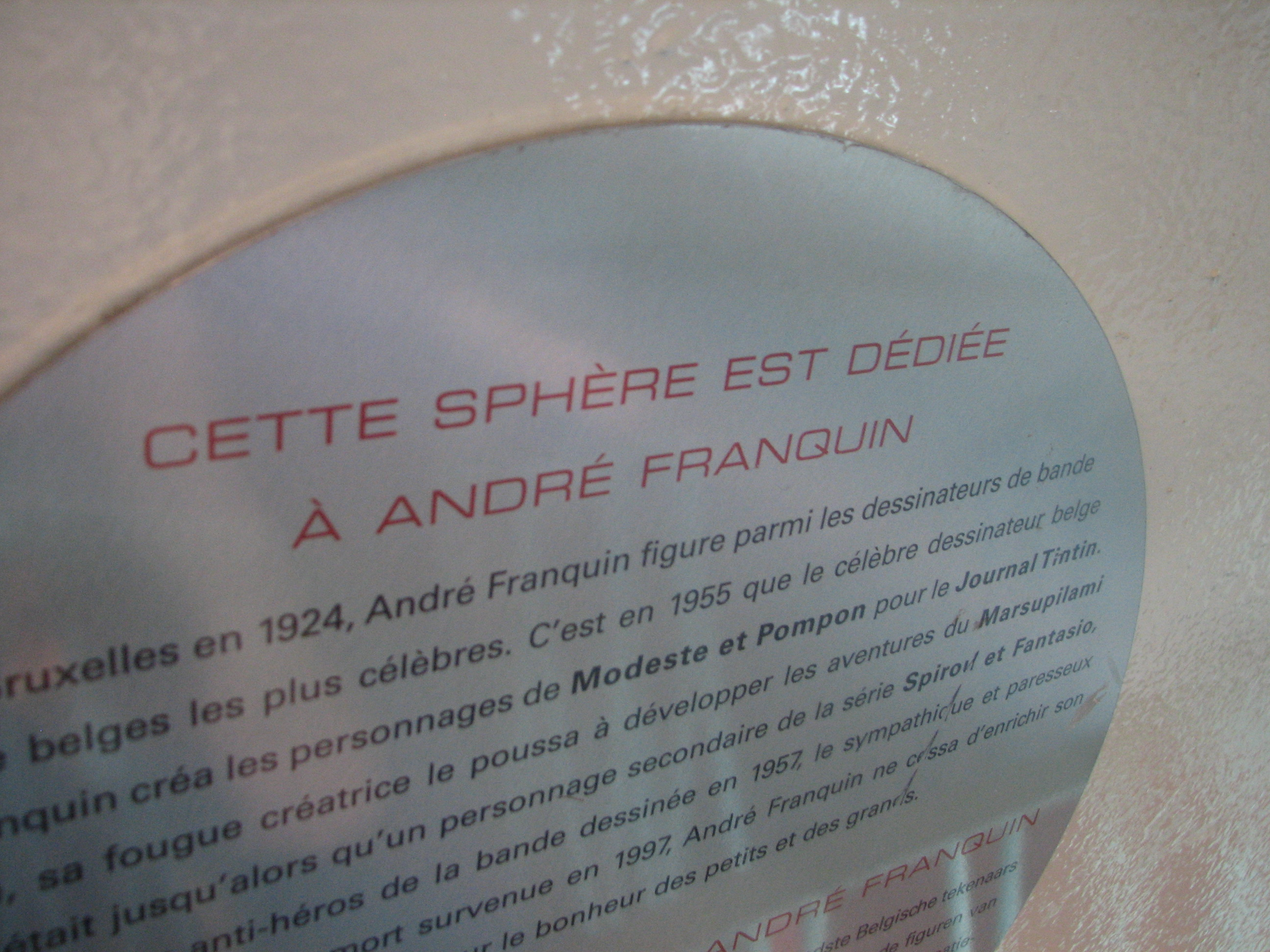 Sign in Brussels, tribute to André Franquin.